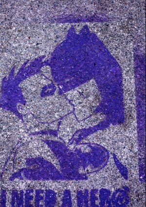 gaelx. (2007, febrero 9). I need a hero | Flickr: Intercambio de fotos. Recuperado 6 de abril de 2014, a partir de